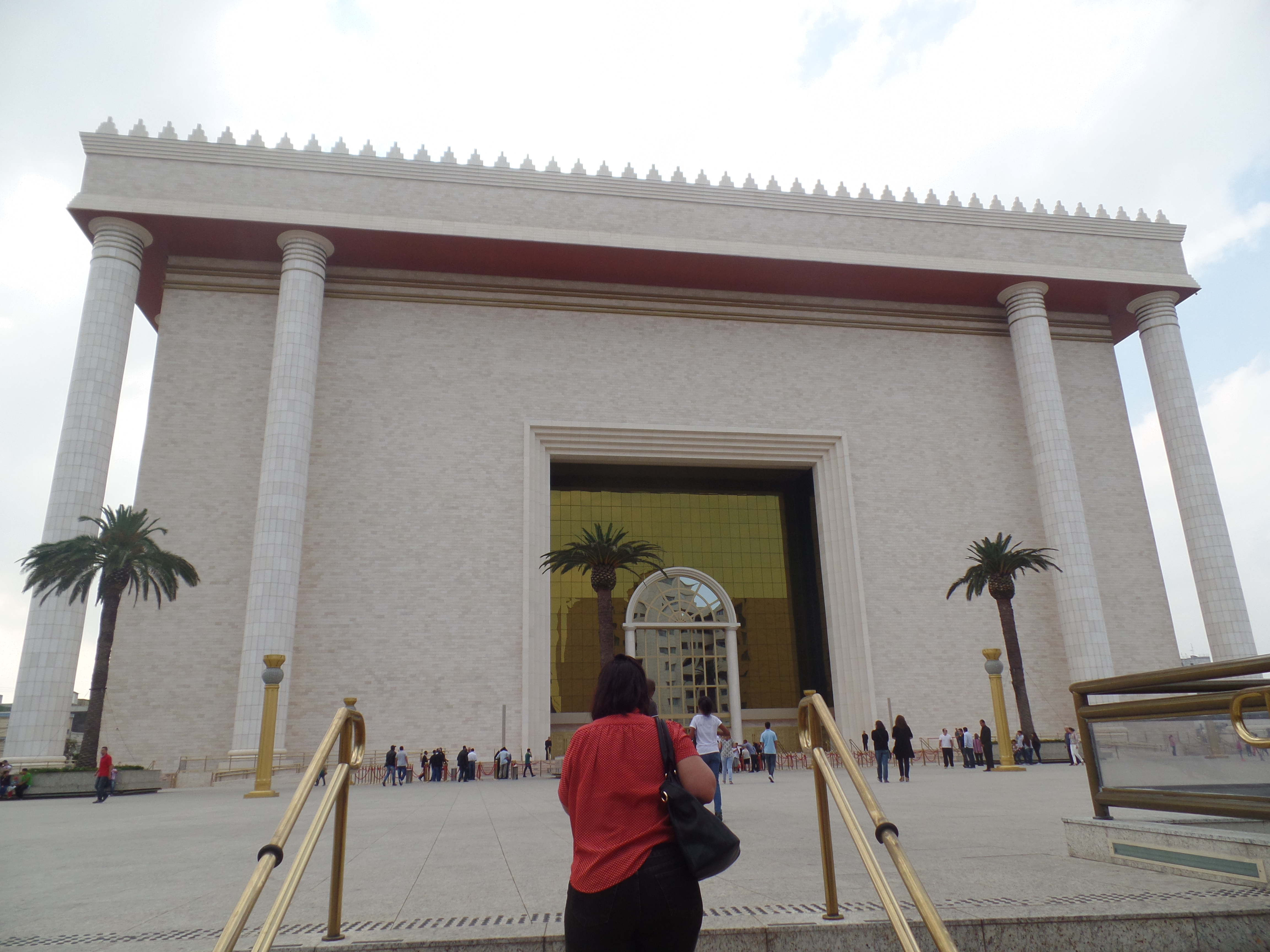 Brás, São Paulo - State of São Paulo, Brazil